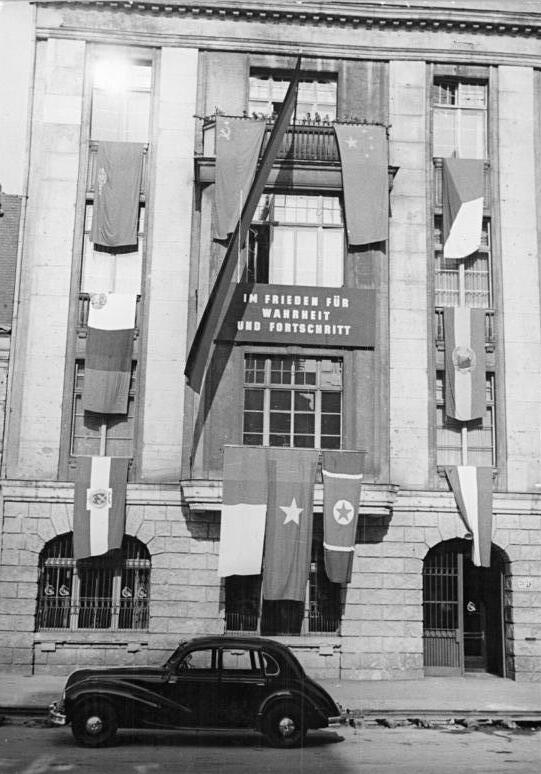 Berlin, Deutsche Akademie der Landwirtschaftswissenschaften Illus Köhler 18.10.1951 Die Deutsche Akademie der Landwirtschaftswissenschaften in Berlin der DDR UBz: Aussenansicht des Gebäudes der Akademie in der Kronenstr. 73.